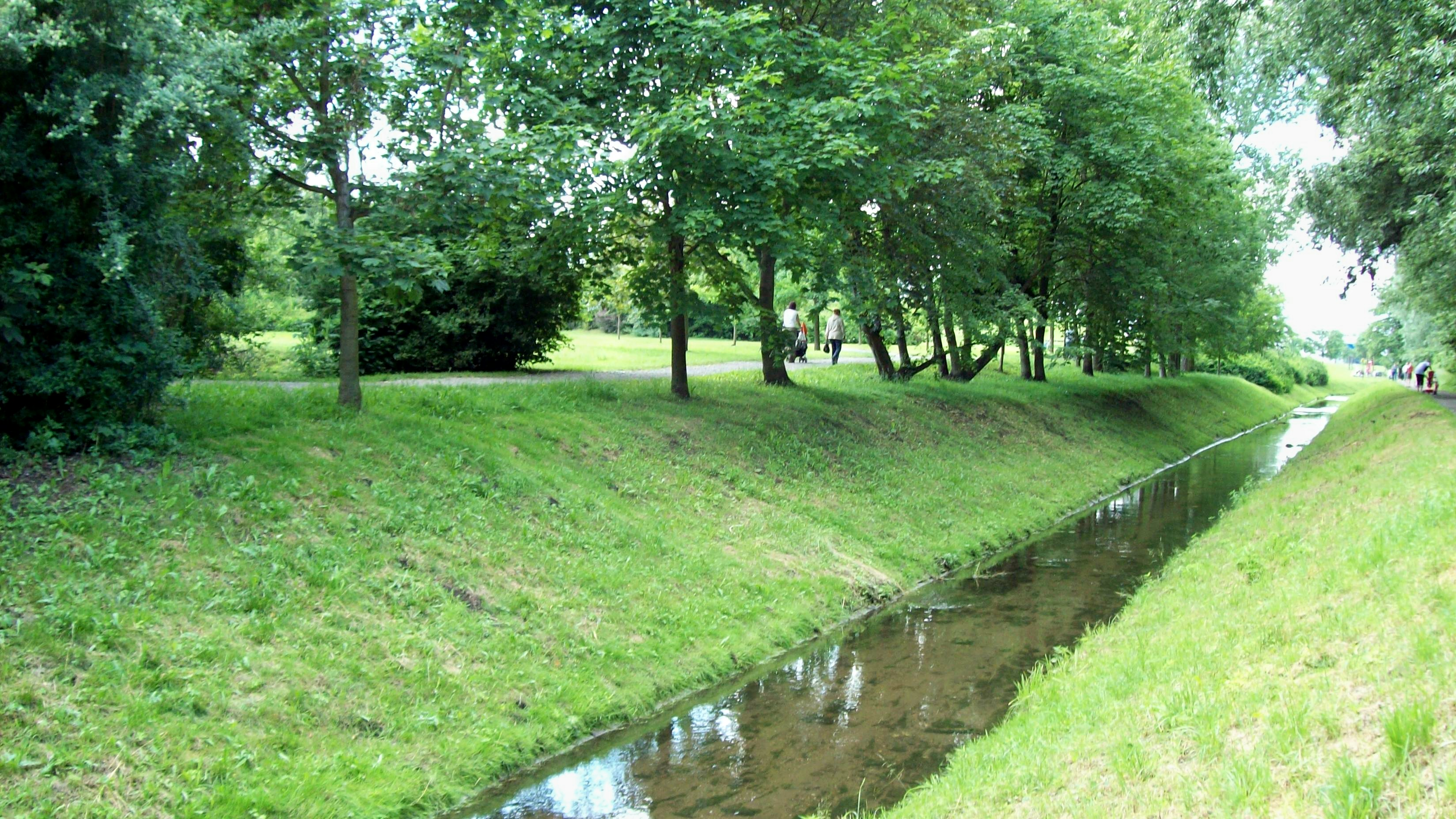 Potok Pšovka, u autobusového nádraží v Mělníku.